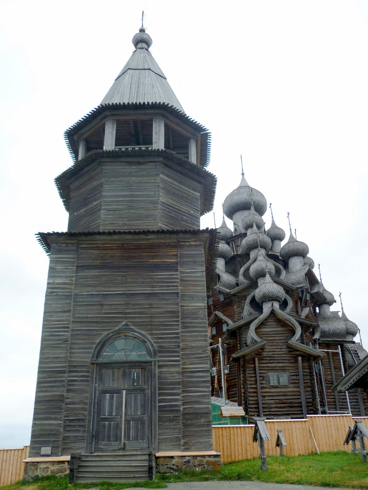 Kizhi